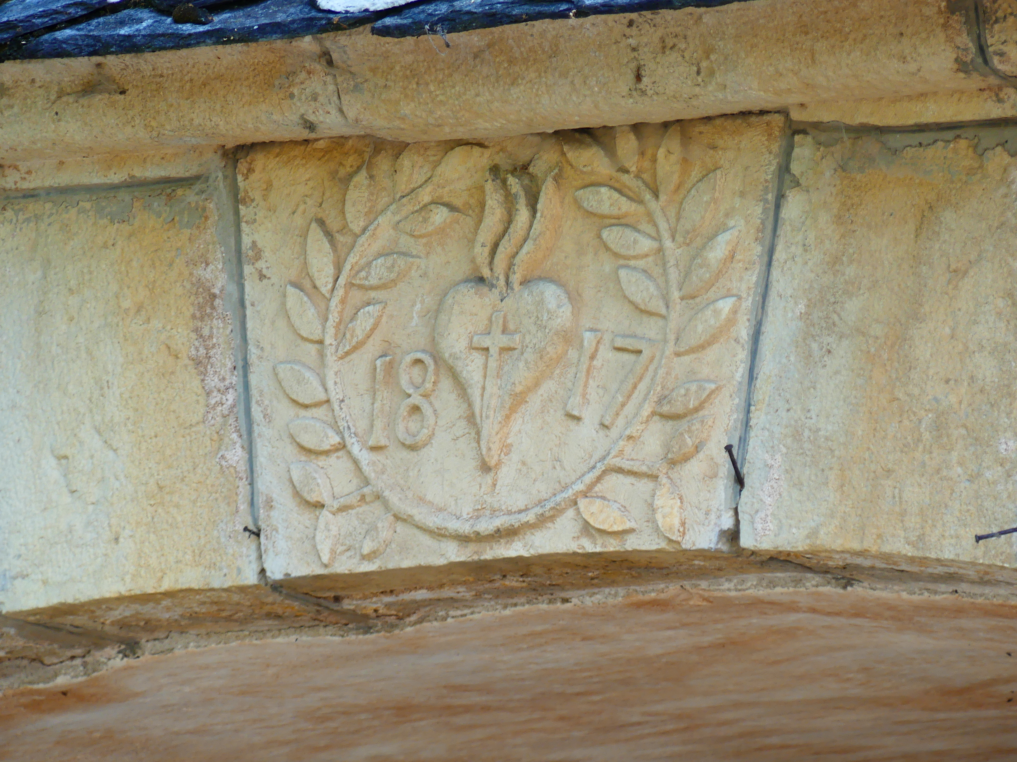 Date inscrite au-dessus de l'entrée du porche, église de Bozouls, Aveyron, France.